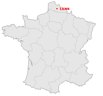 Localisation de Lens (Pas-de-Calais)